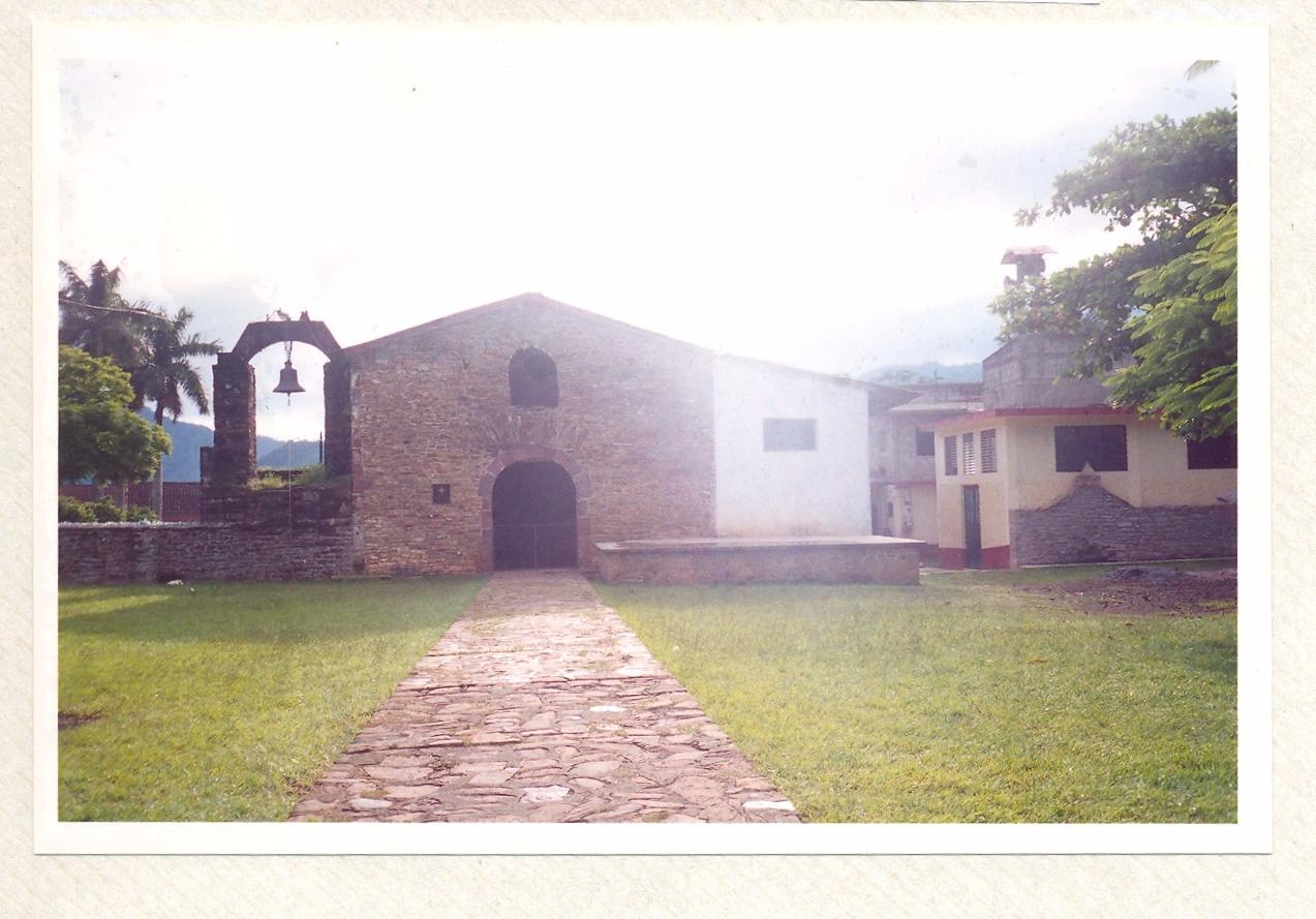 Foto de la iglesia de Coacuilco, Hidalgo.